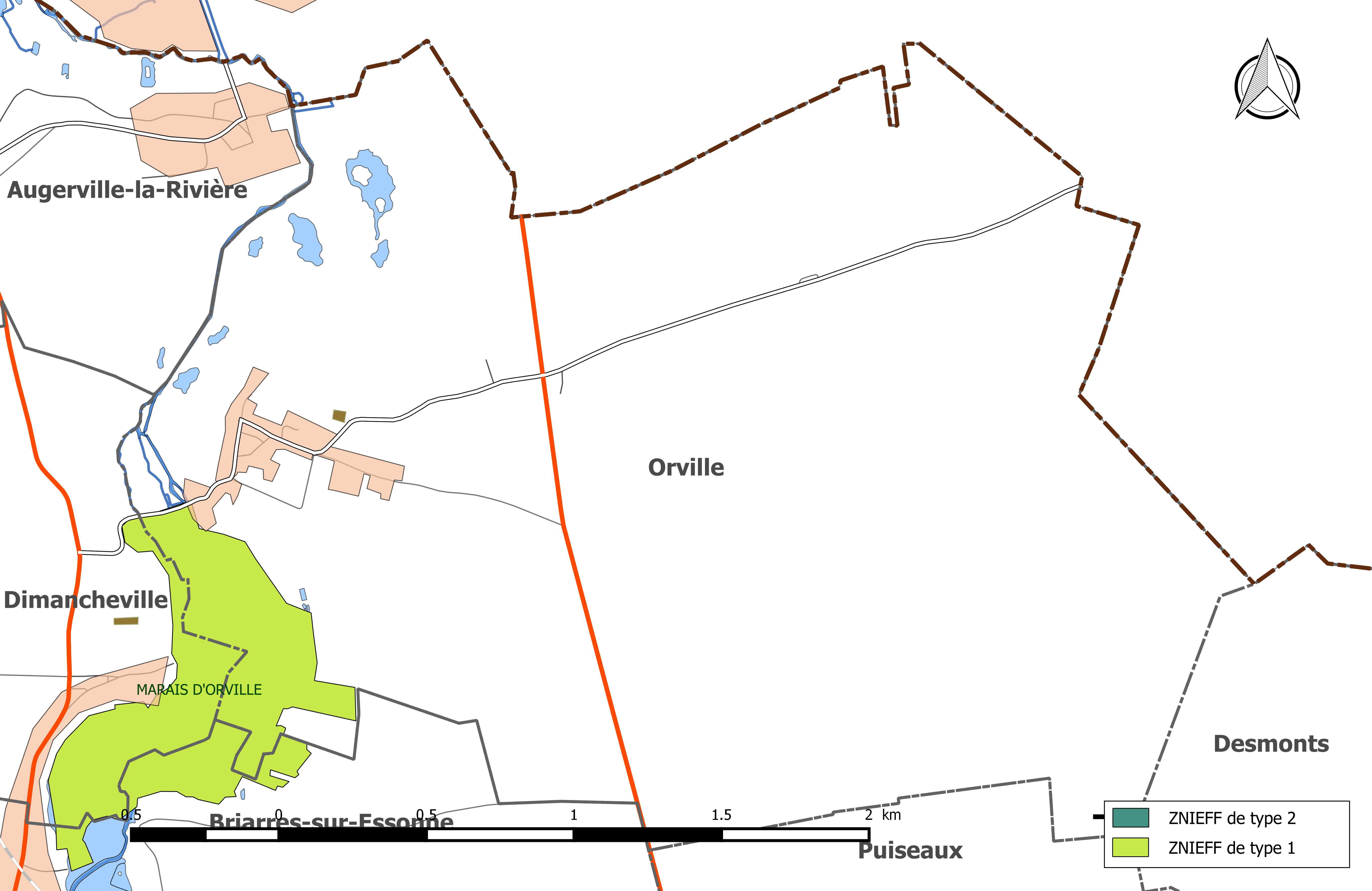 Carte des Zones naturelles d'intérêt écologique faunistique et Floristique (ZNIEFF) de la commune de Orville (Loiret).